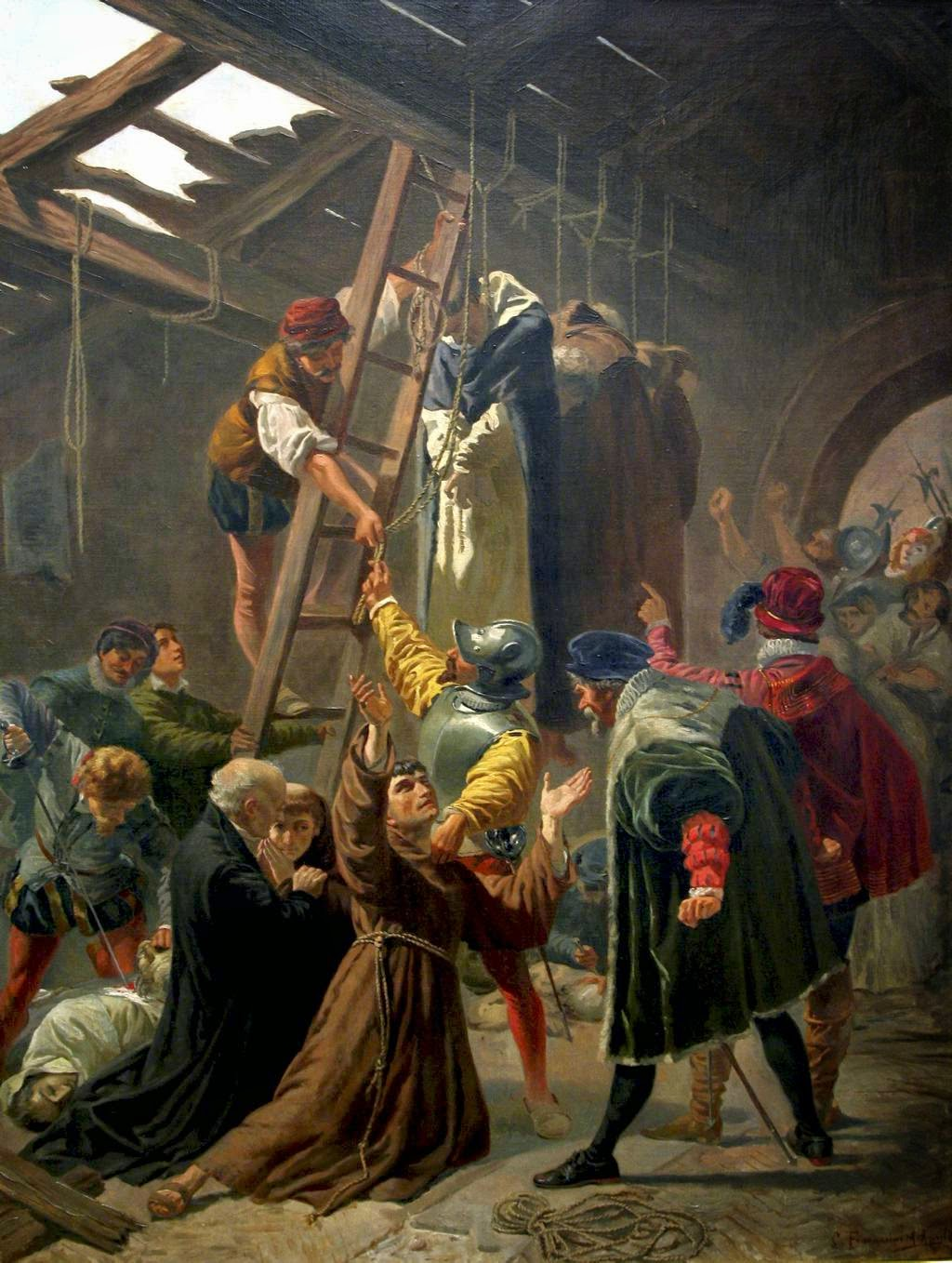 Représentation du martyr de Gorkum en 1572. Peinture de Cesare Fracassini (1838-1868) exposée au Vatican.